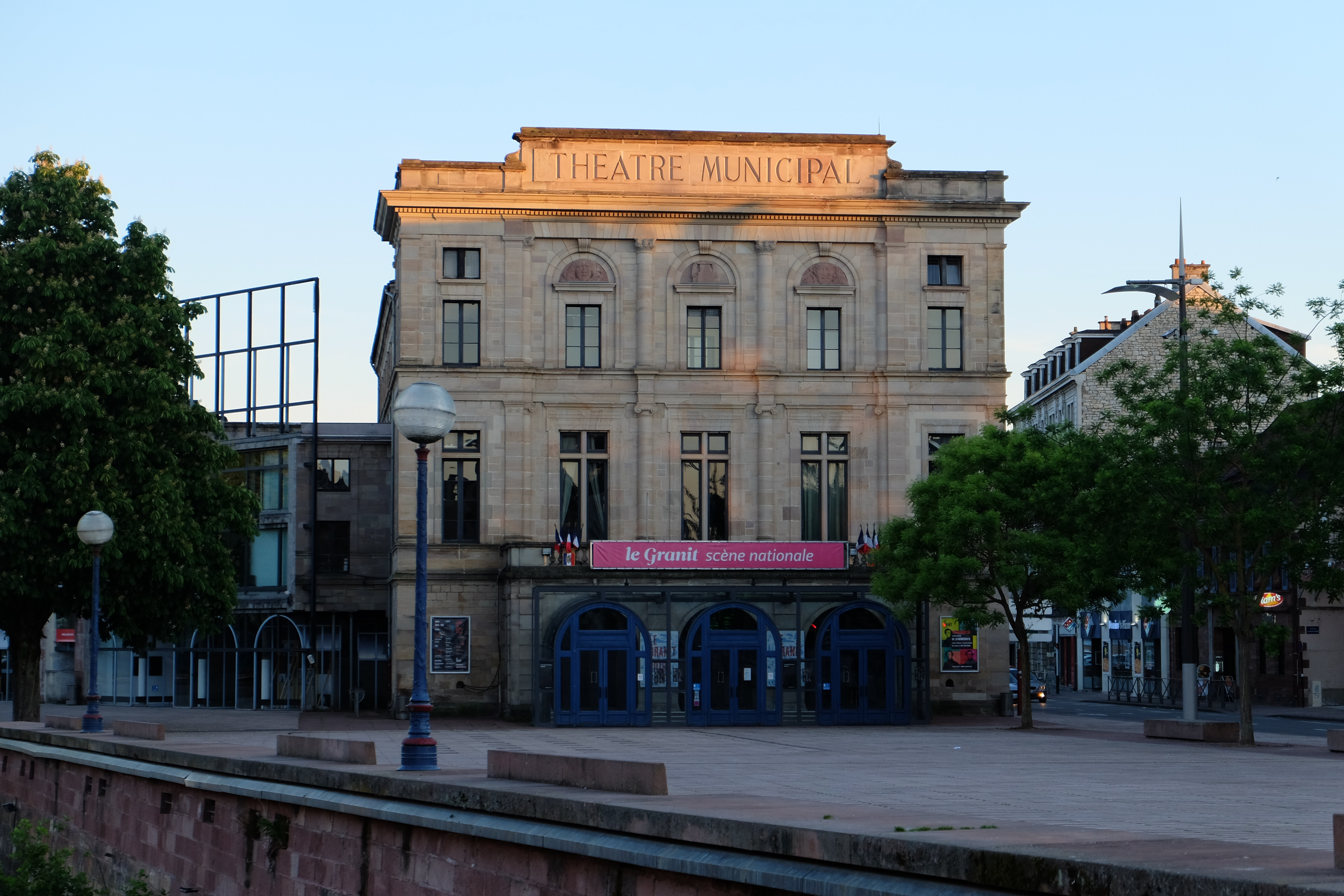 Le théatre Granit, Belfort